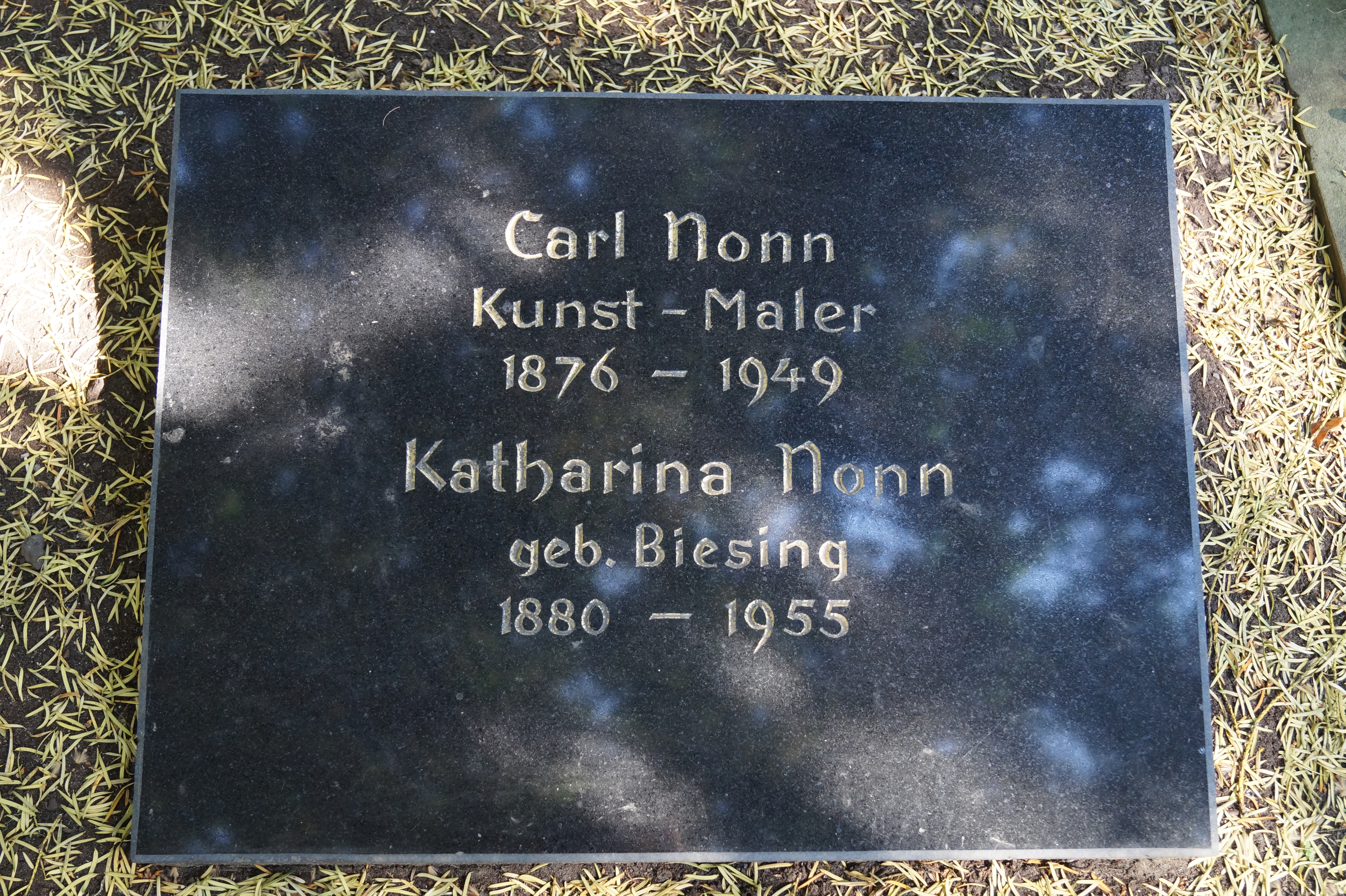 Grabplatte von Carl und Katharina Nonn auf dem Familiengrab Biesing/Nonn (Alter Friedhof Bonn)